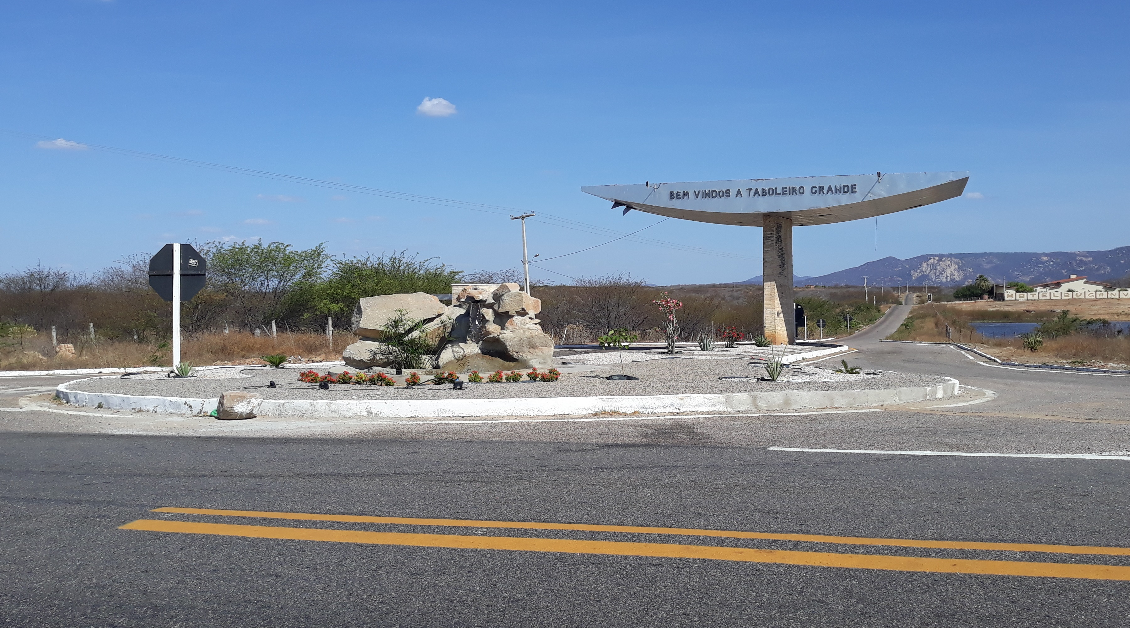 Pórtico de entrada de Taboleiro Grande, Rio Grande do Norte (Brasil), no cruzamento da BR-405 com a rodovia estadual RN-071.